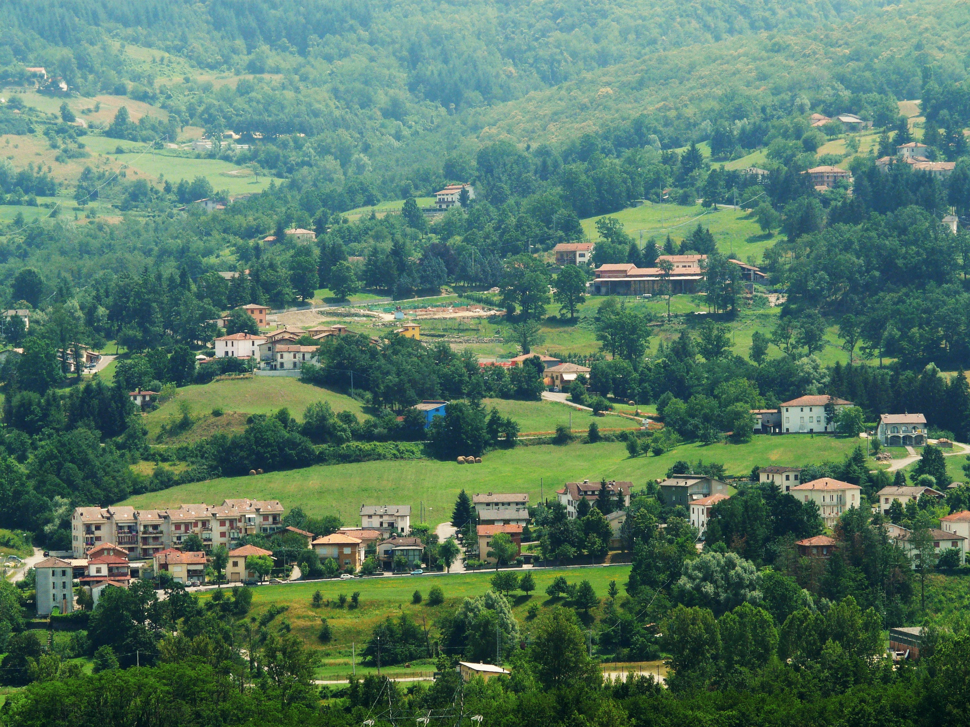 Albareto, provincia di Parma, Emilia Romagna, Italia